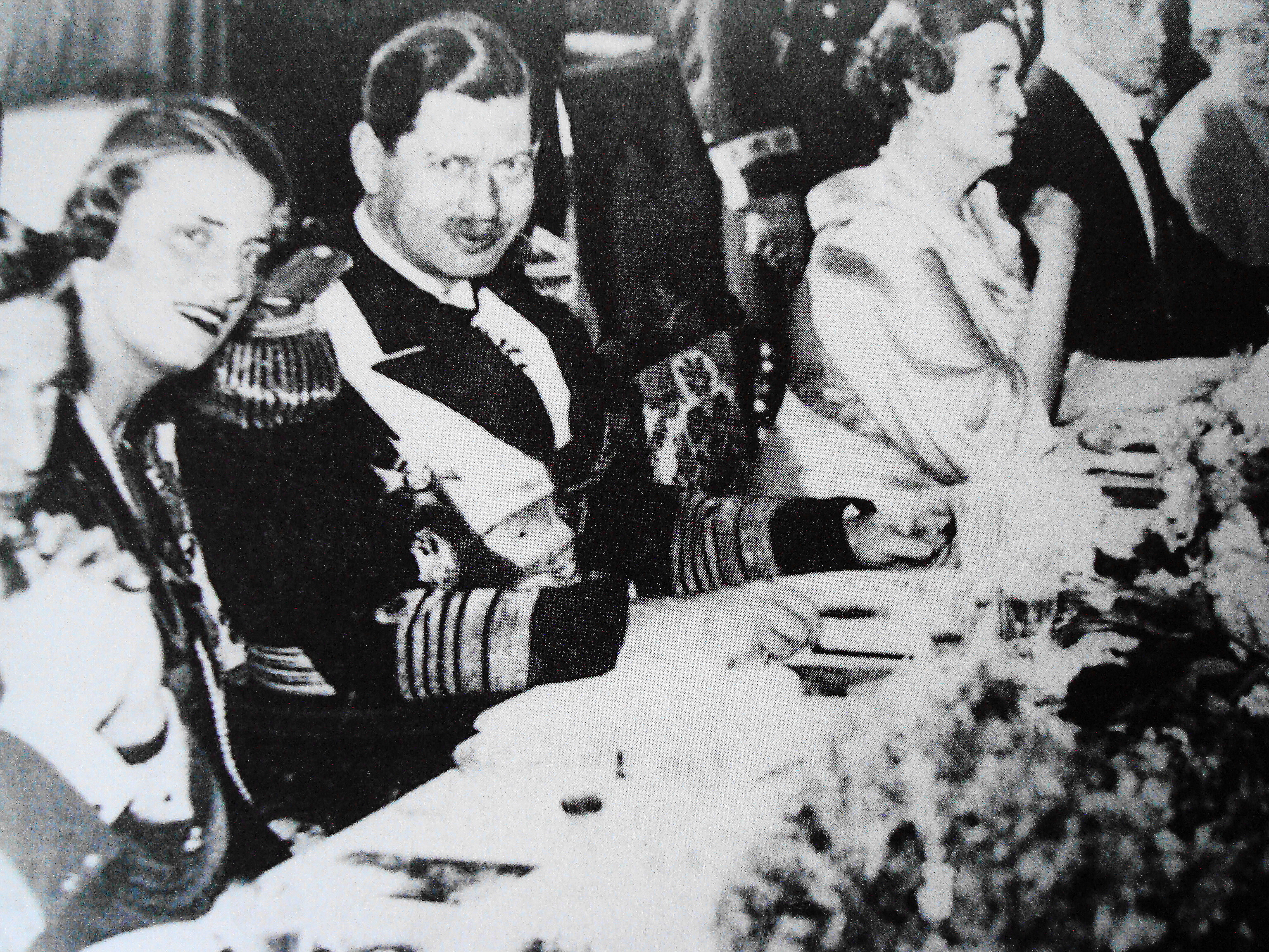 Karol II, król Rumunii, na bankecie z okzaji urodzin jego matki.